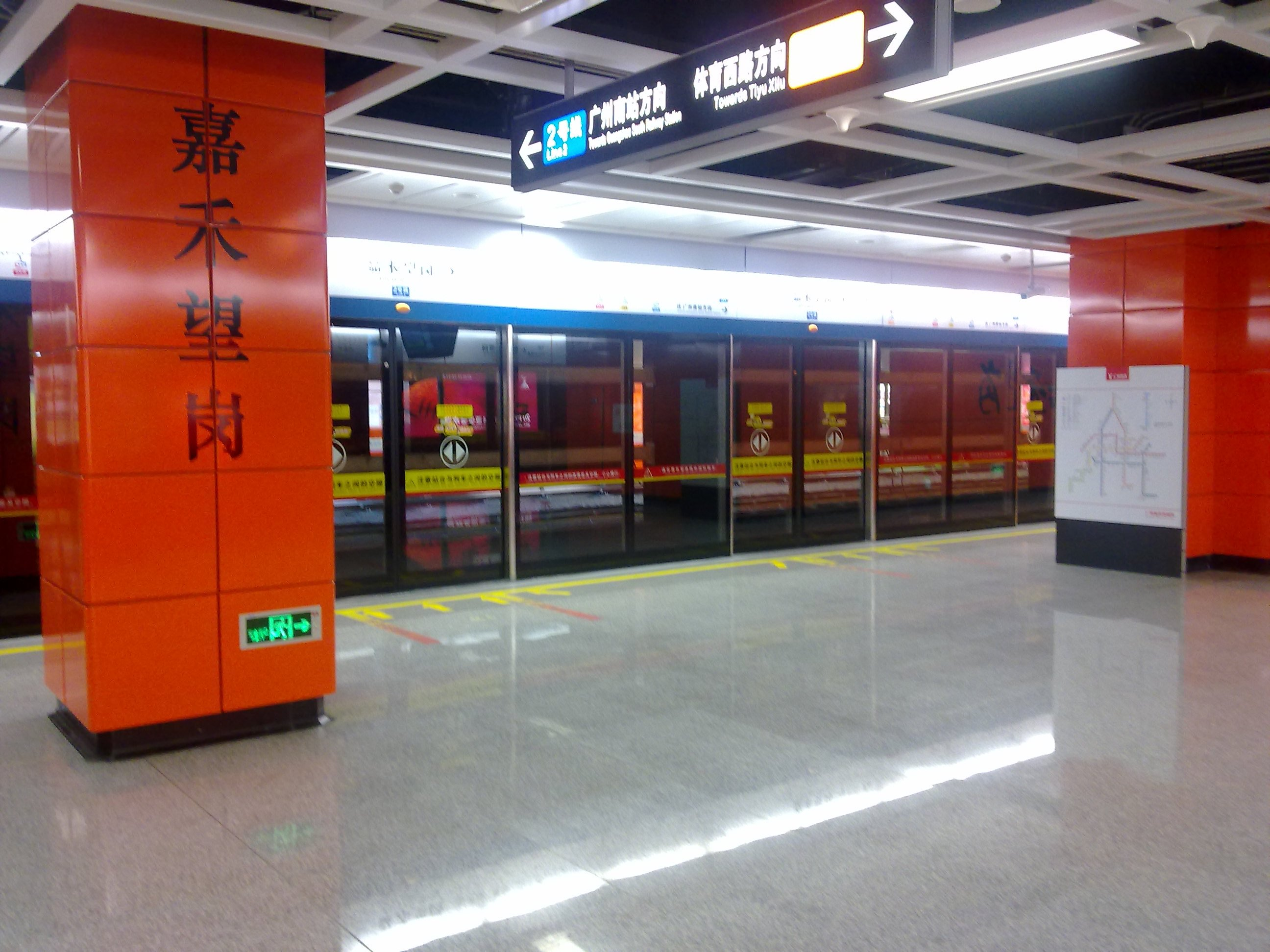 廣州地鐵嘉禾望崗站站台